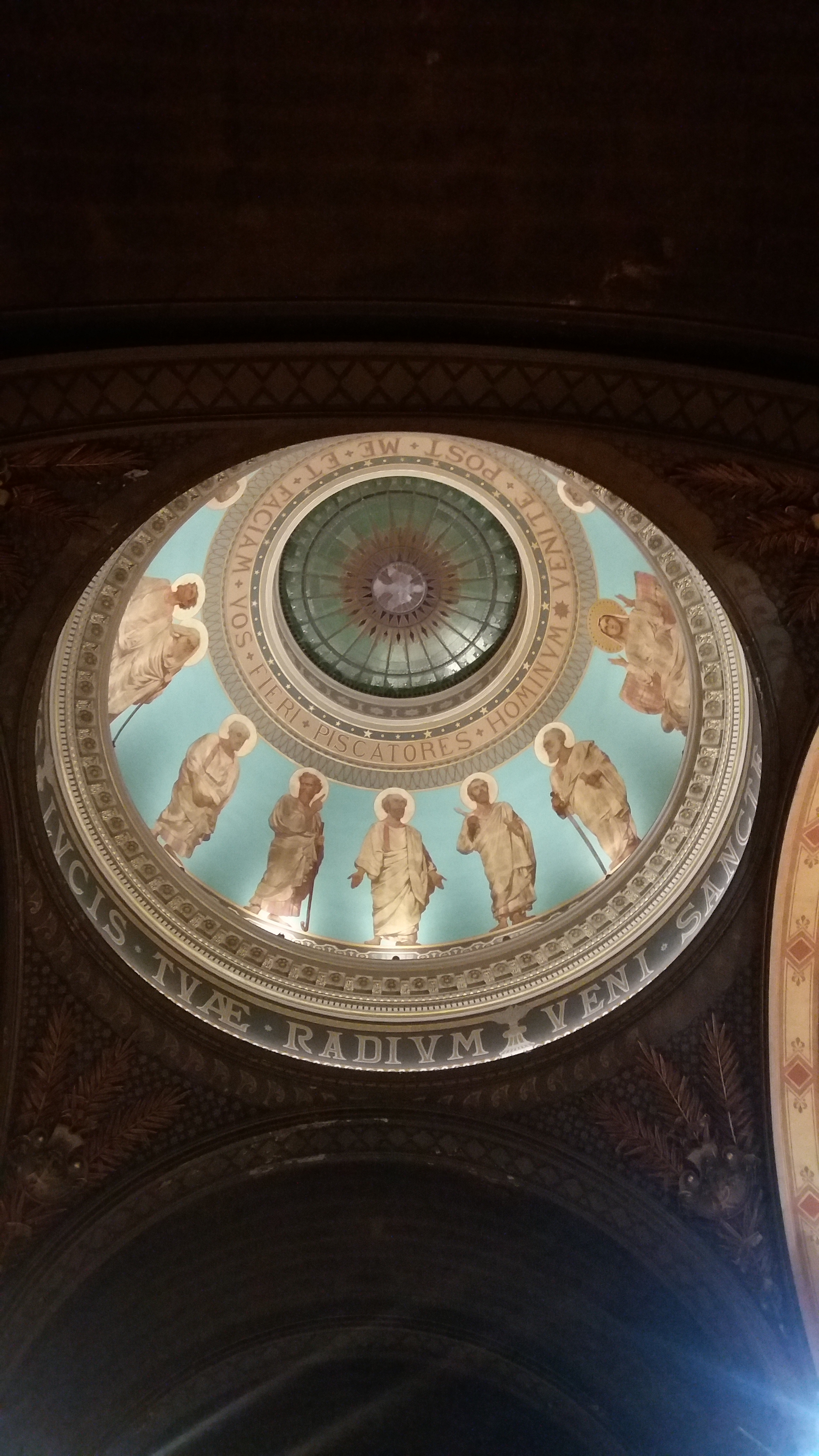 Peintures de la coupole.